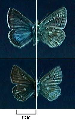 Agriades rusticus